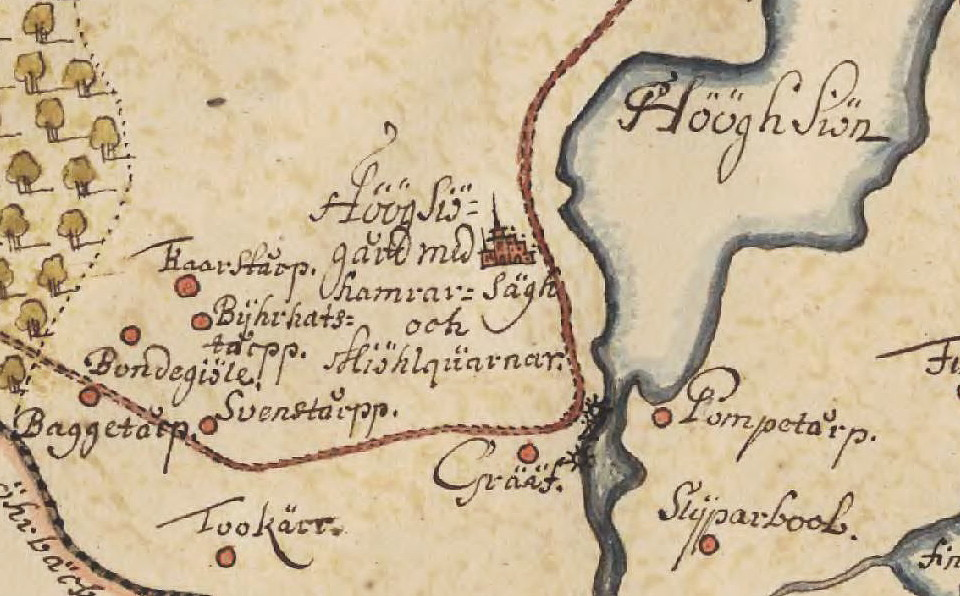 Del av karta över Vingåkers socken visande Högsjögård och Högsjön